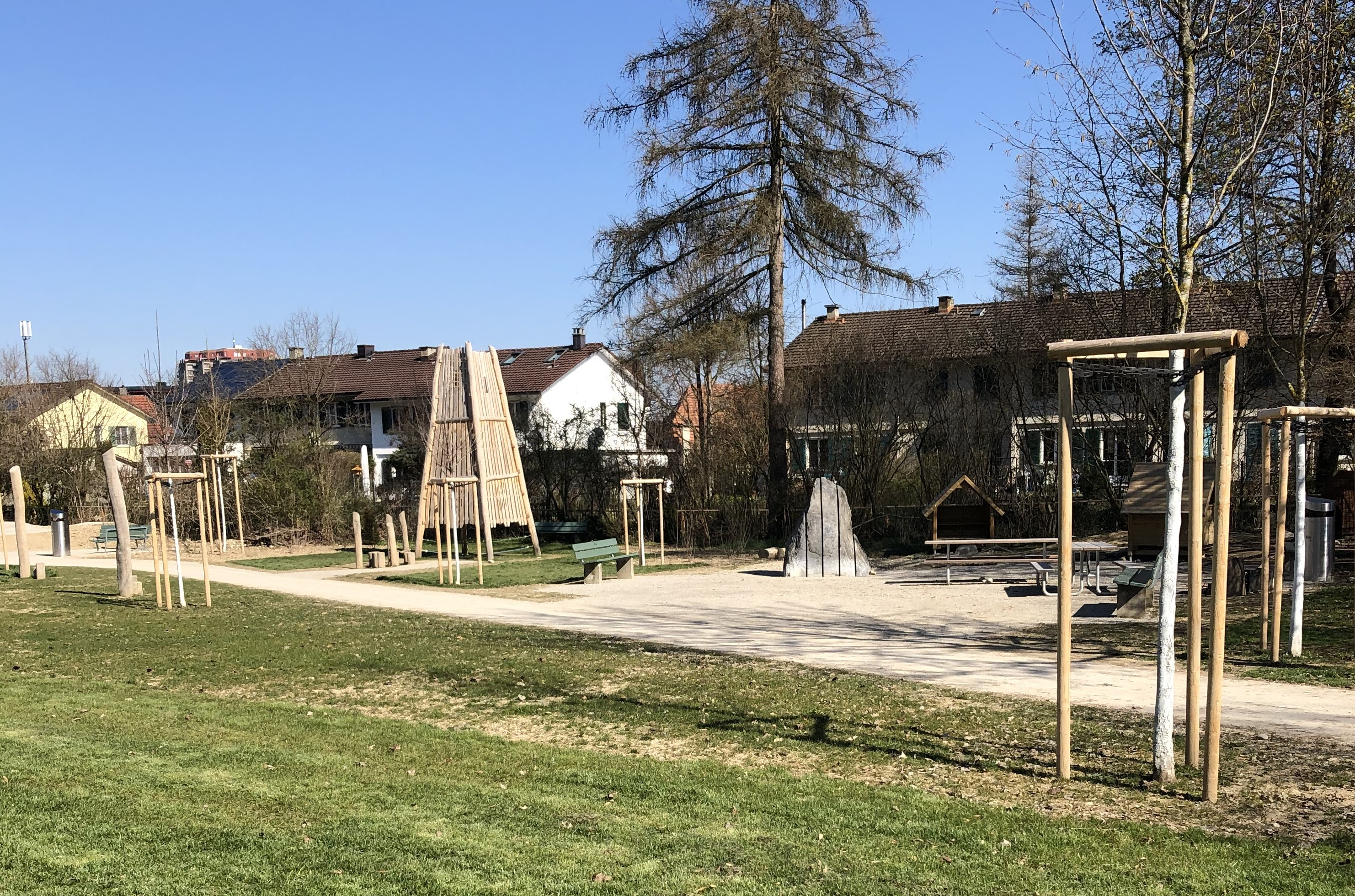 Winterhale Spielplatz